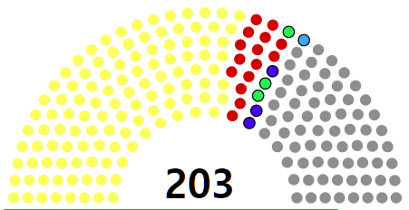 자유당: 114 seats 민주국민당: 15 seats 대한국민당: 3 seats 대한독립촉성국민회: 3 seats 제헌국회의운동지회: 1 seat 무소속: 67 seats